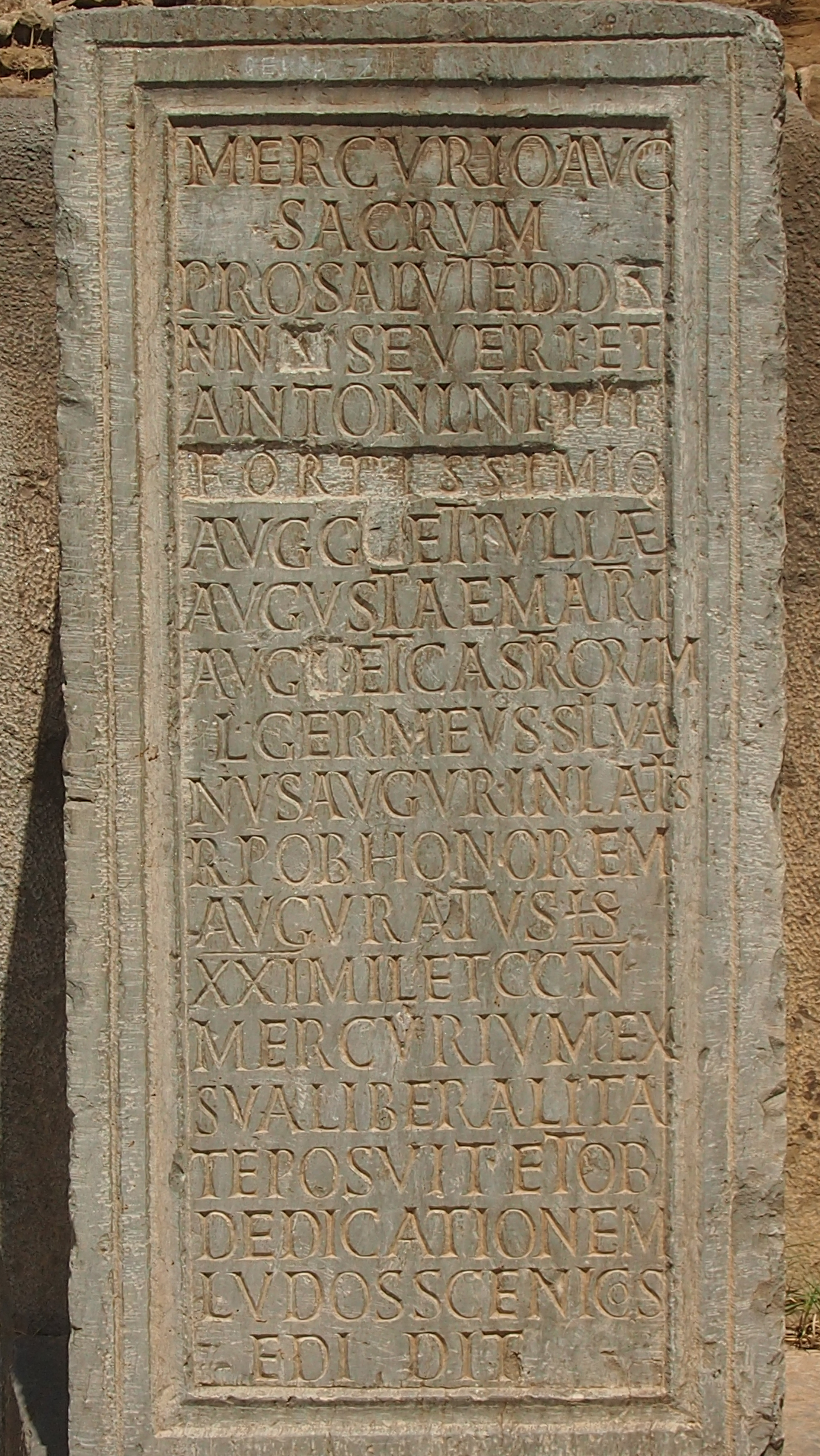 Territoires et monuments de l'antique Thamugadi.